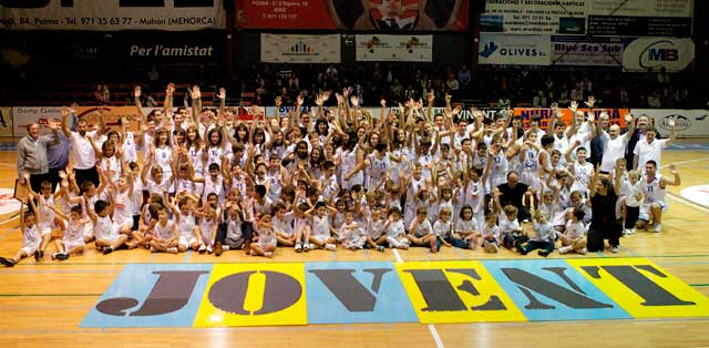 Aquesta foto és d'una presentació de fa uns quants anys al Poliesportiu d'Alaior.